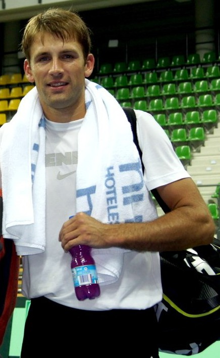 Łukasz Kubot, polski tenisista.